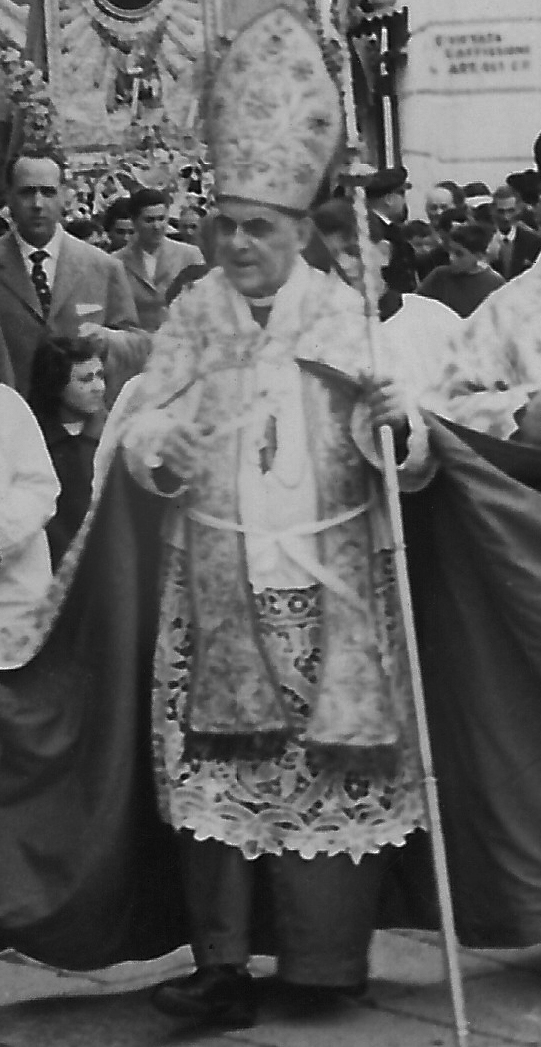 Mons. Gaetano De Cicco (Vescovo della Diocesi di Sessa Aurunca) ritratto in una foto della Processione dei Santi Patroni della città di Sessa Aurunca del Lunedì in Albis 1959.